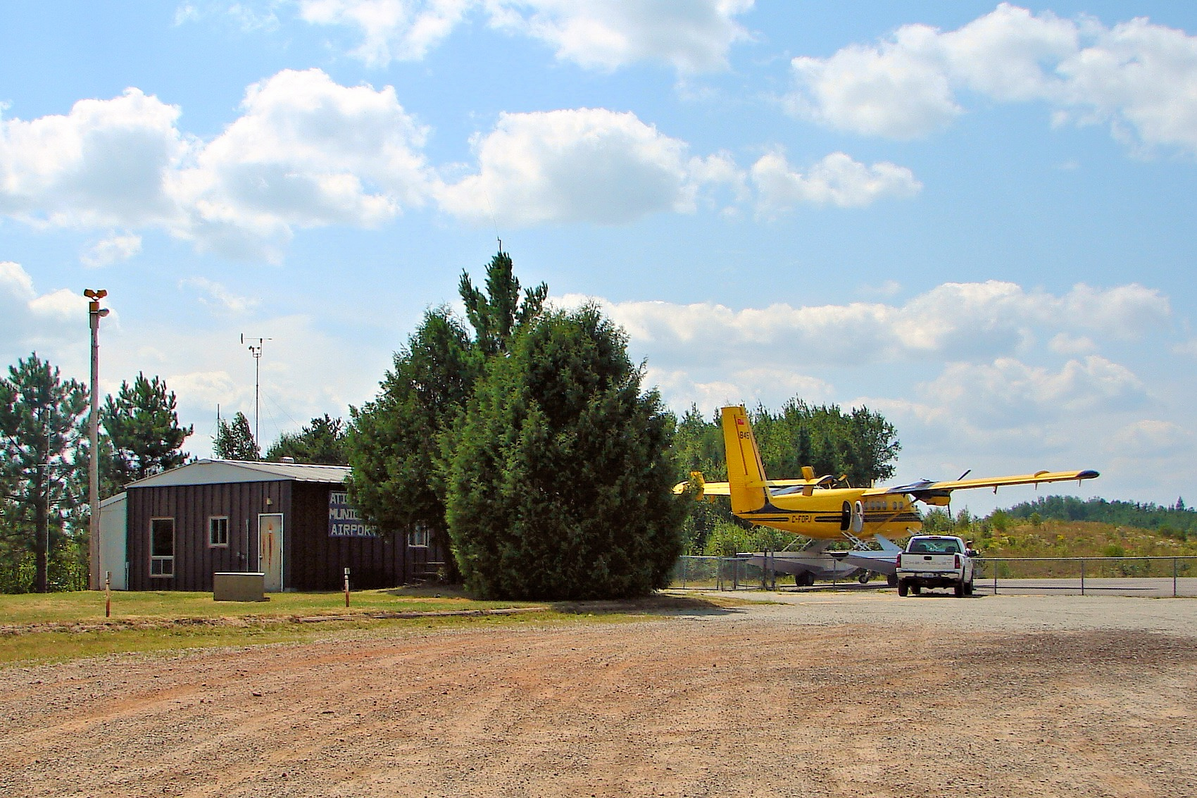 Atikokan Airport, Ontario, Canada